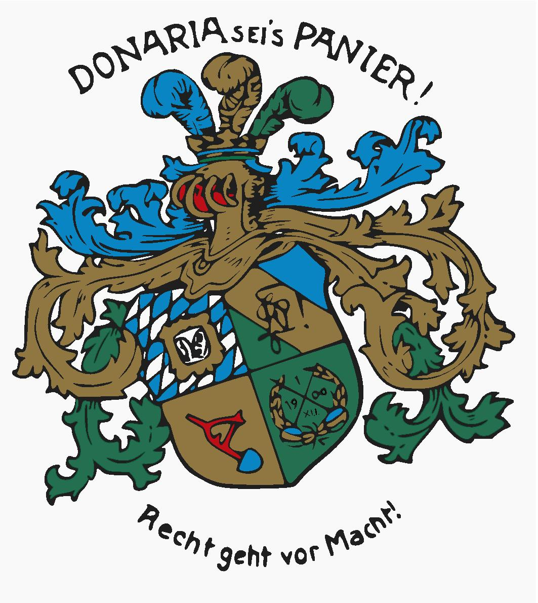 Studentenwappen des Corps Donaria zu Weihenstephan